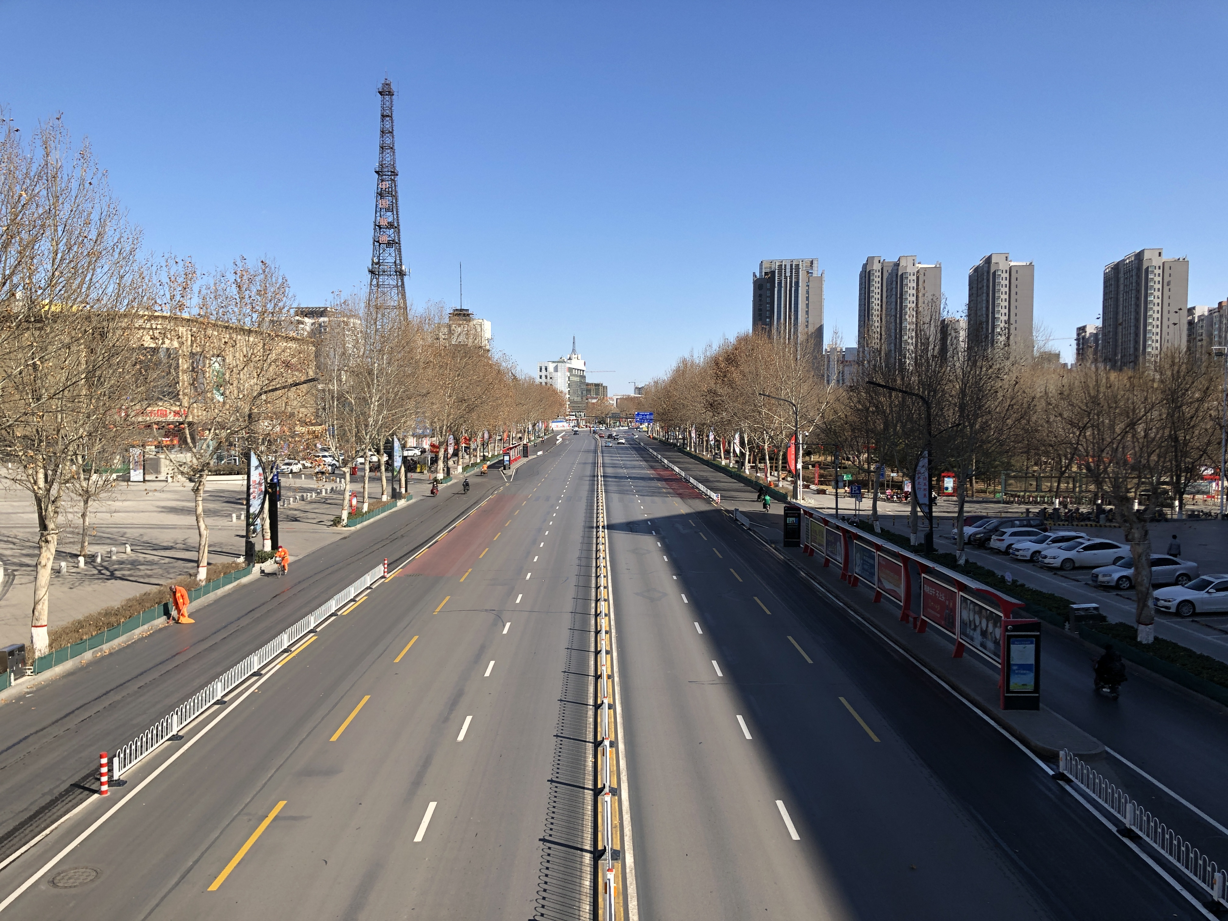 中文（中国大陆）: 2019冠状病毒病疫情期间邢台中兴西大街